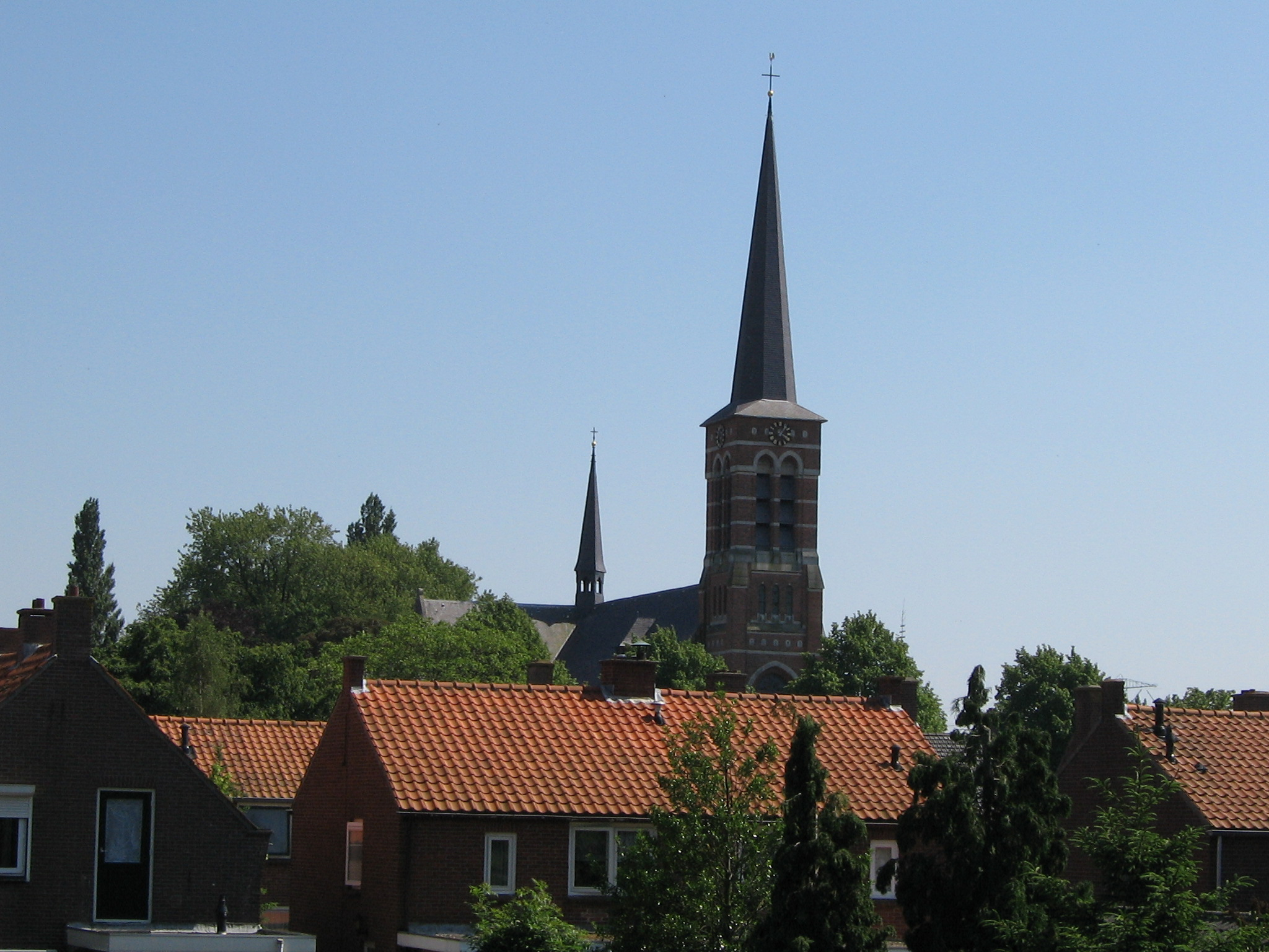 Kedamme.Kwadendamme, gemeente Borsele, Zeeland, NL.